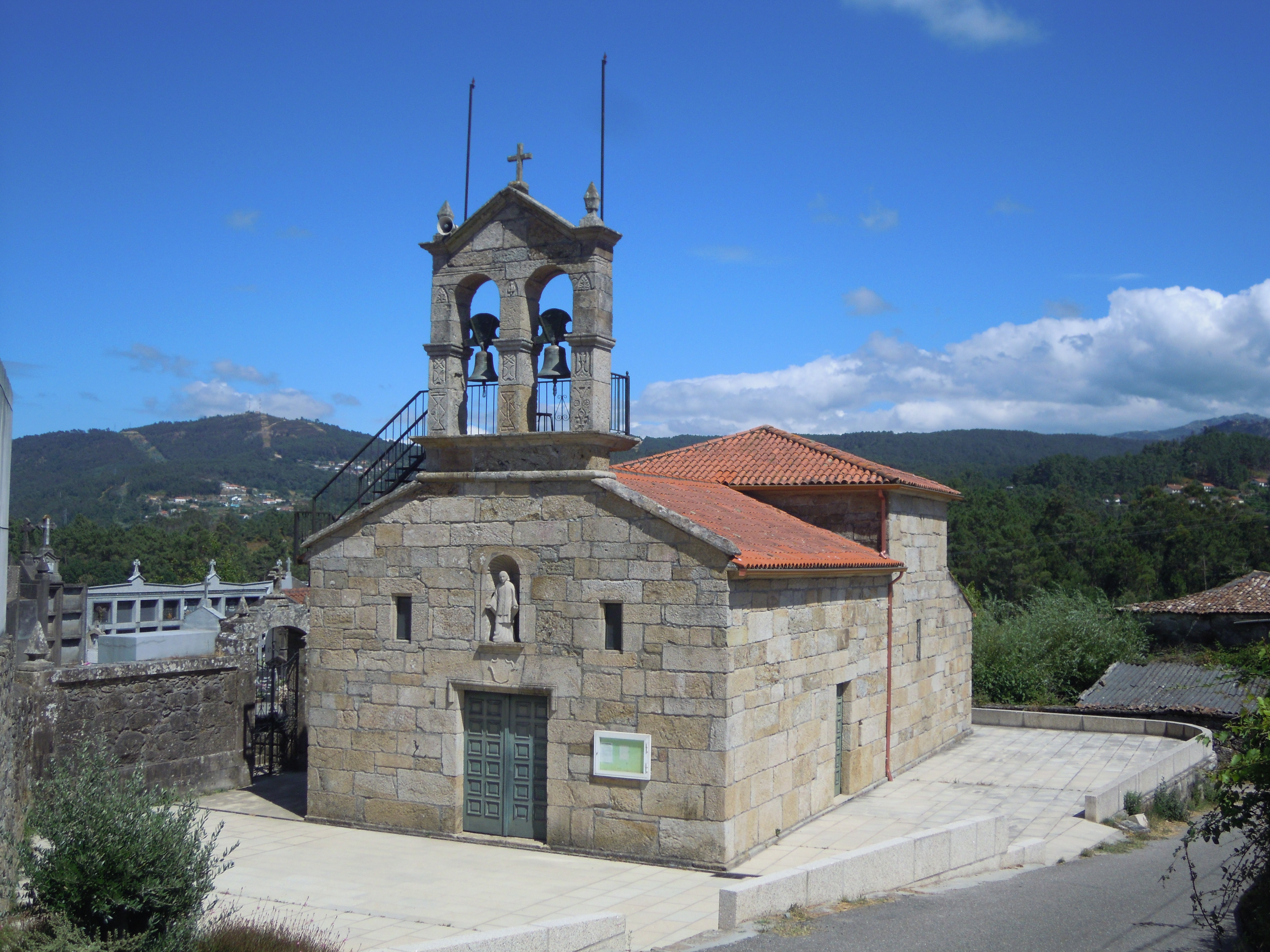 Igrexa de San Caetano de Quintela (Crecente)